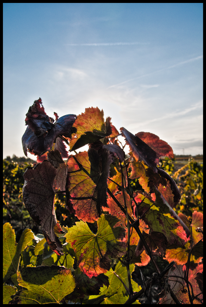 Feuillage de negrette à Fronton